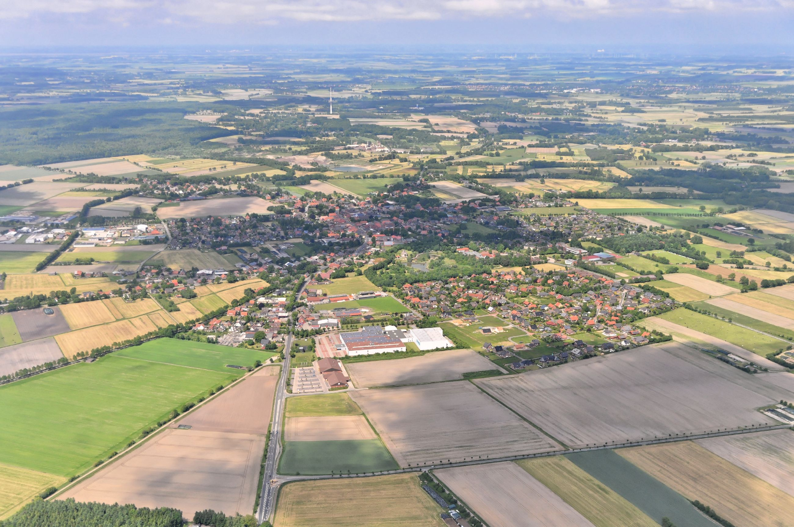 Überführungsflug vom Flugplatz Schwarzheide-Schipkau über Potsdam, Lüneburg zum Flugplatz Nordholz-Spieka